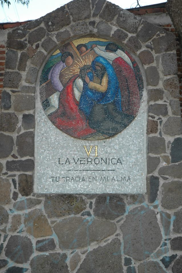 Es un arte elaborado por el artista Luis Sahagún Cortés